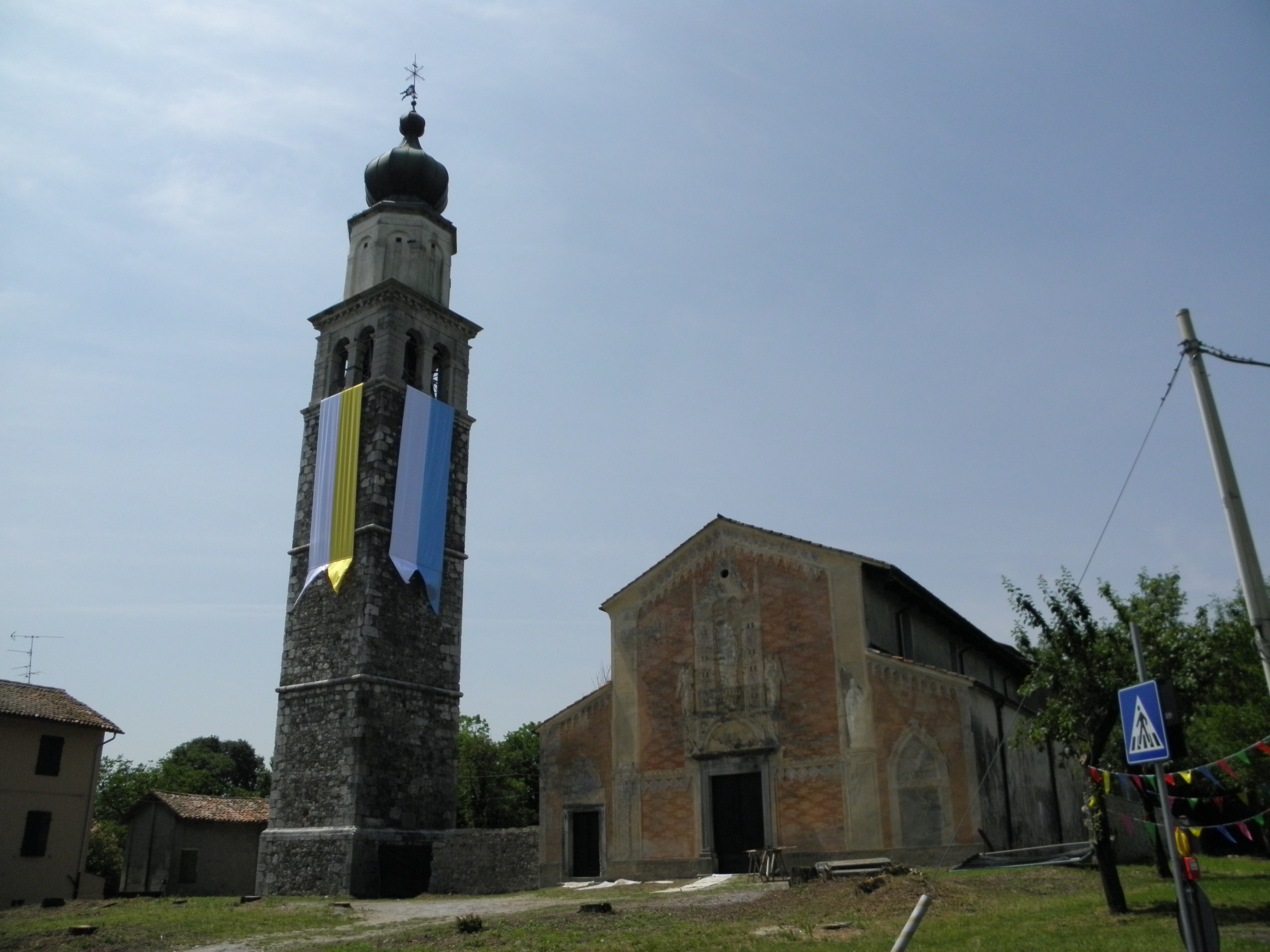 Martignacco, la vecchia chiesa sconsacrata di Santa Maria Assunta.